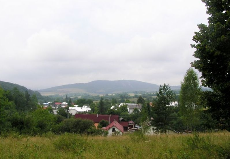 Celkový pohľad